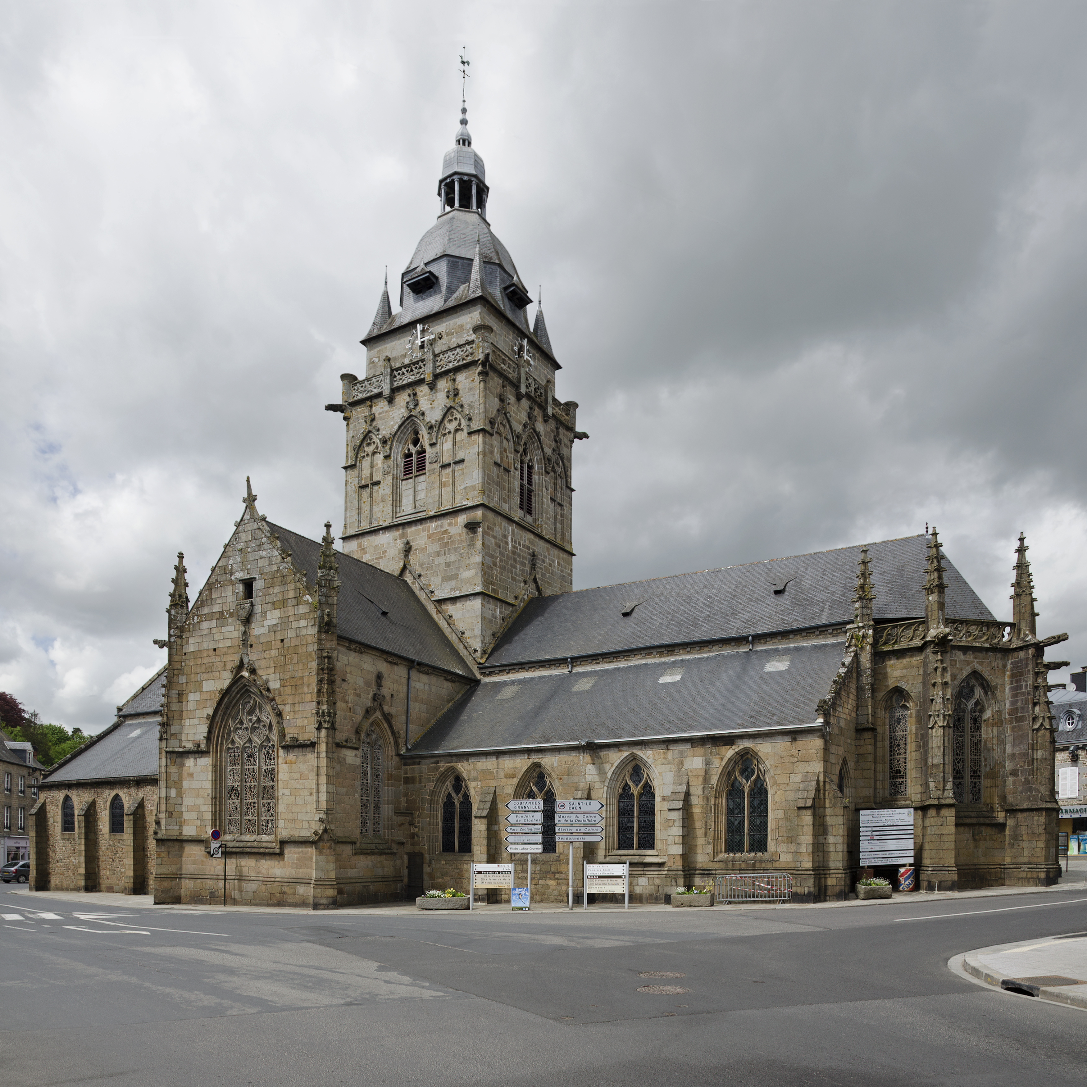 Église Notre-Dame de Villedieu-les-Poêles, Manche, Normandie, 2013.